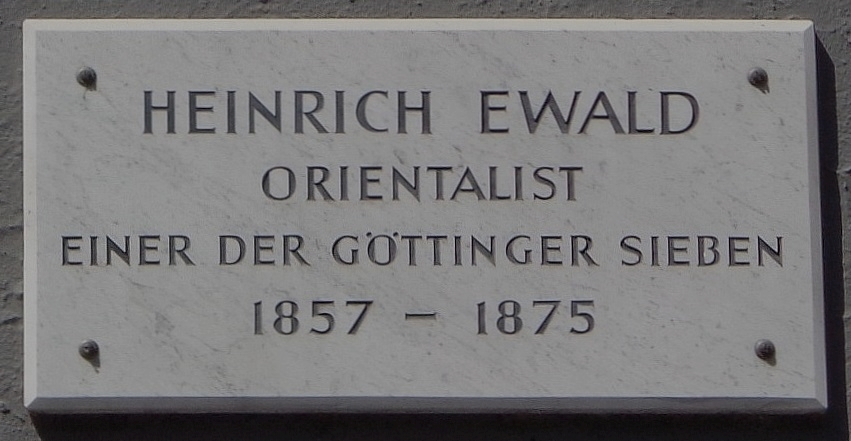 Göttinger Gedenktafel für Heinrich Georg August Ewald (Lange Geismarstraße 56)